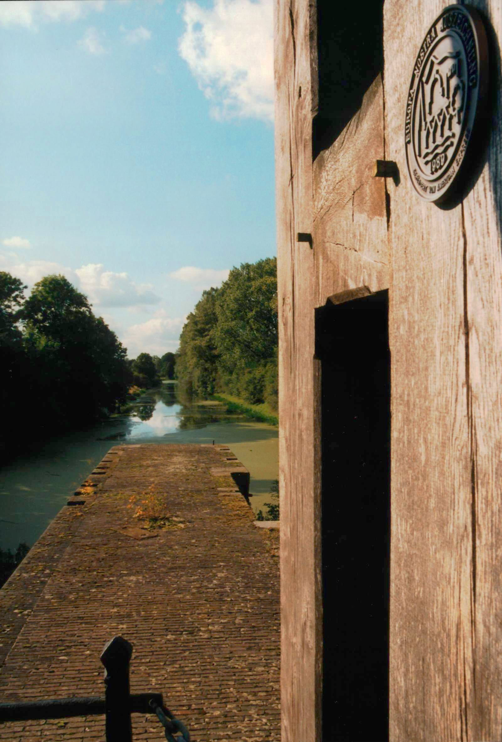 Blick auf den Eiderkanal von der Holländerklappbrücke an der Schleuse bei Krummwisch.